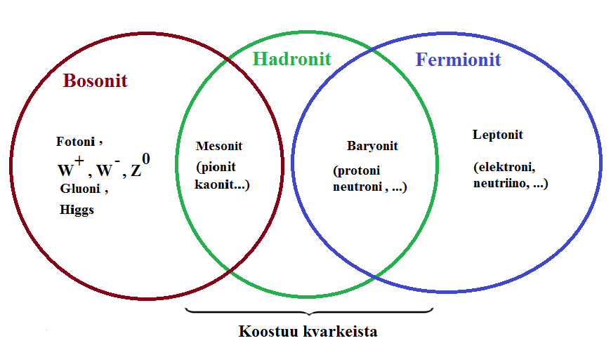 Omatekoinen muunnos toisesta kuvasta. Tarpeeksi erilainen ollakseen itsenäinen teos. Kuvaa on muutettu alkuperäiskielen osalta, kuvioiden osalta ja kielen osalta. Lisäksi kuvassa olevat tiedot ovat yleistä tekijänoikeudetonta “public domain” tietoa.